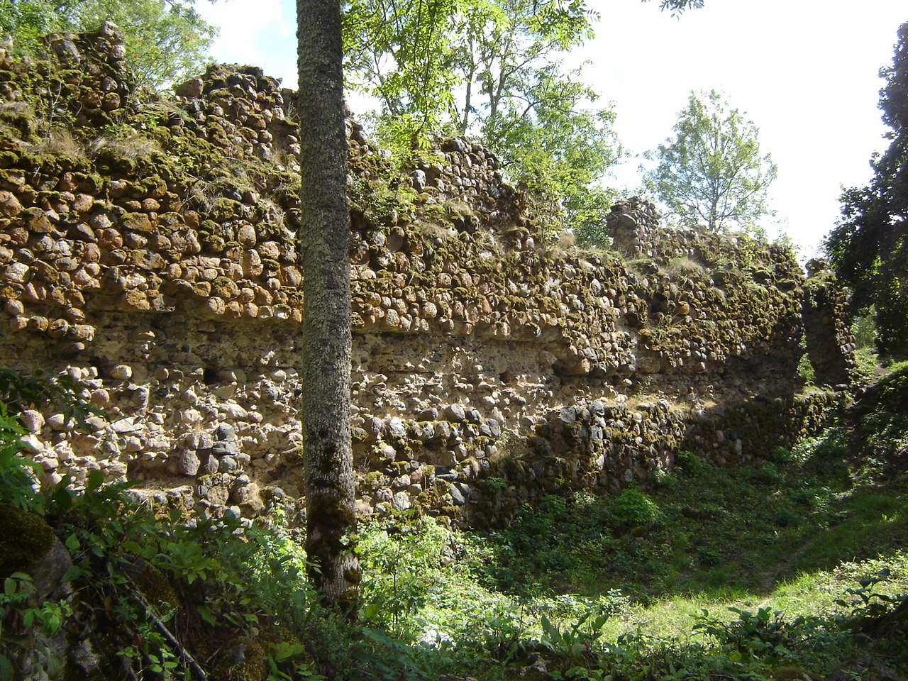 Helme ordulinnuse müürid.